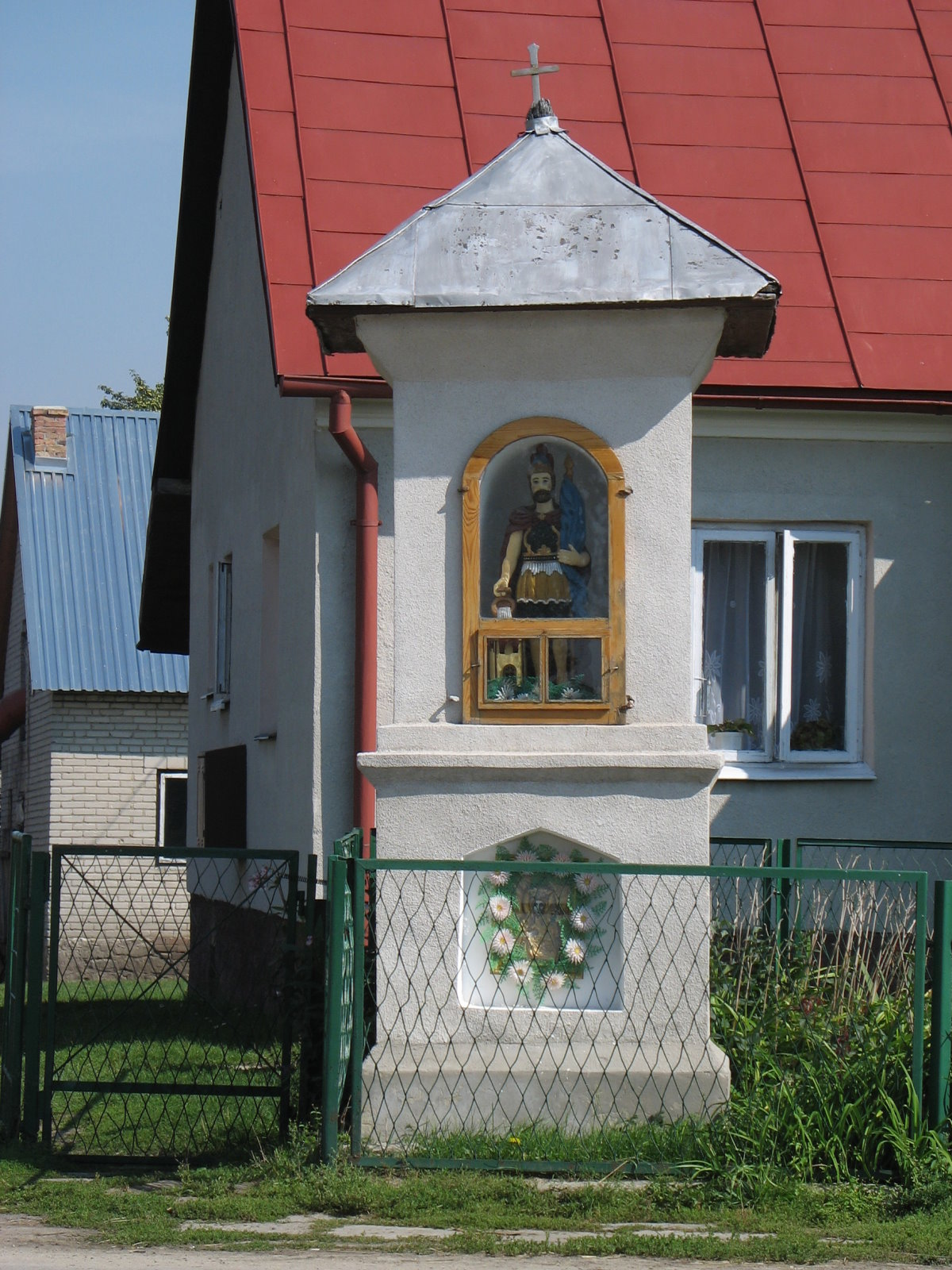 Niemstów (Poland)